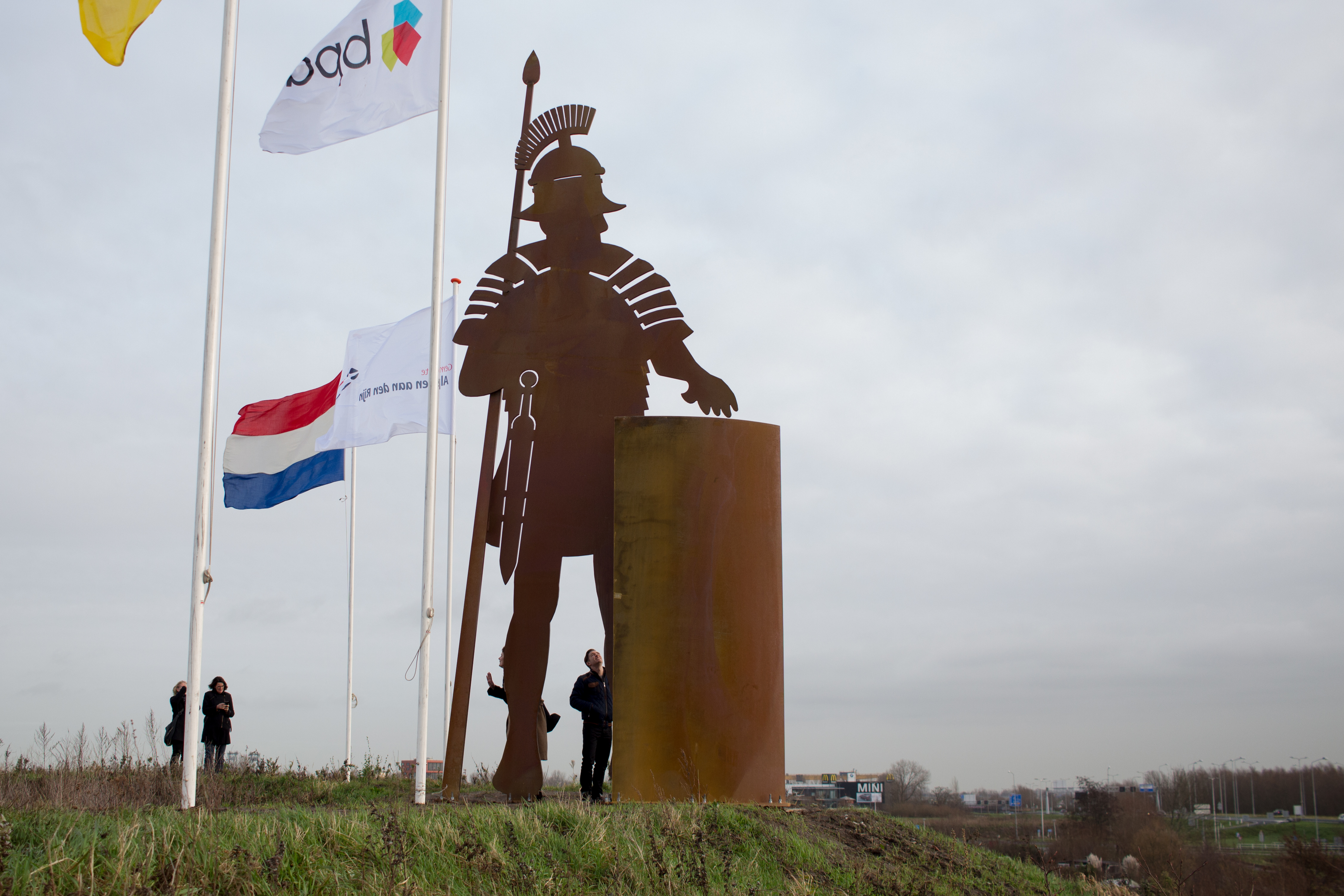 Julius Albanianus